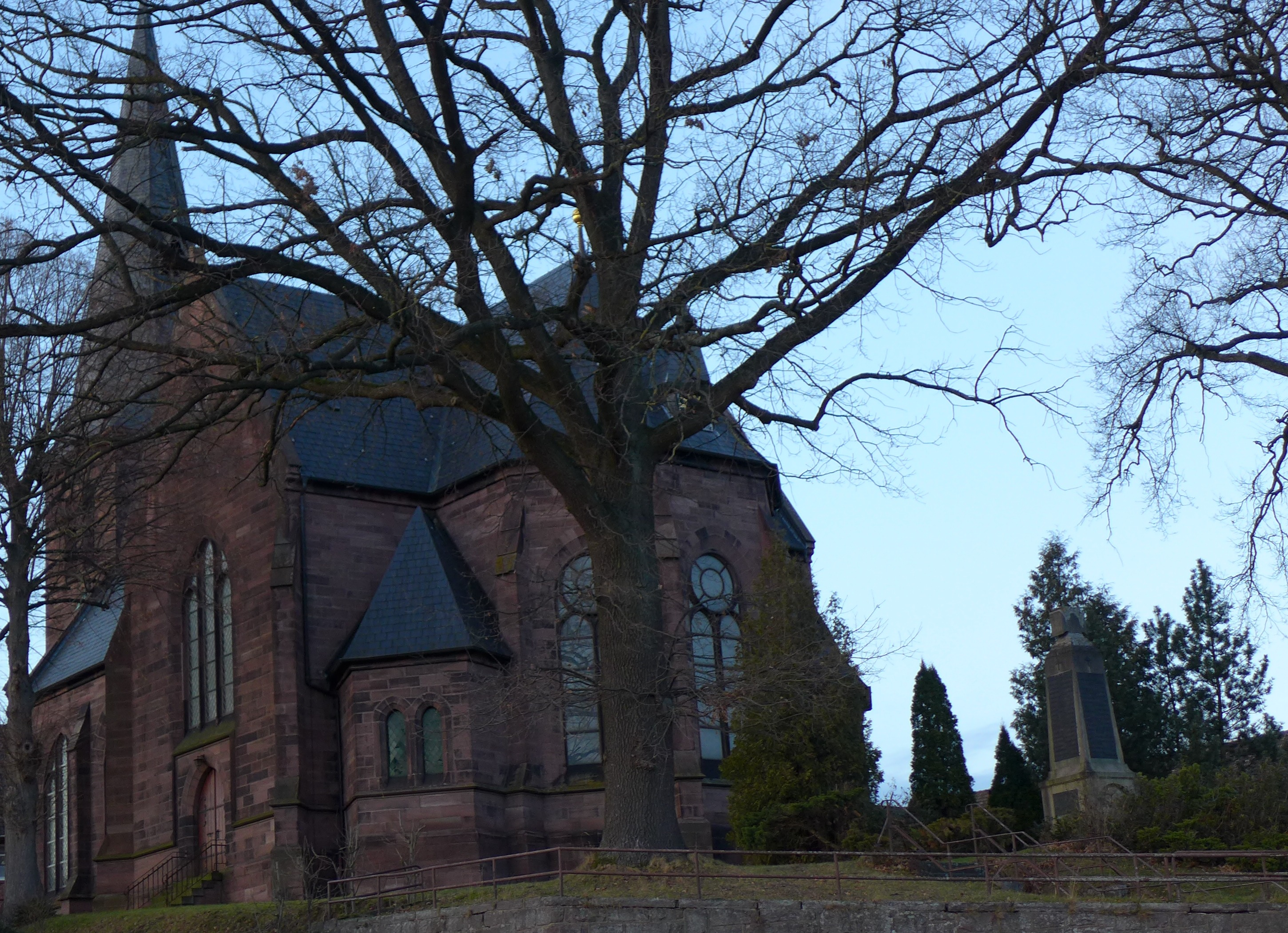 Kirche und Kriegerdenkmal in Halle